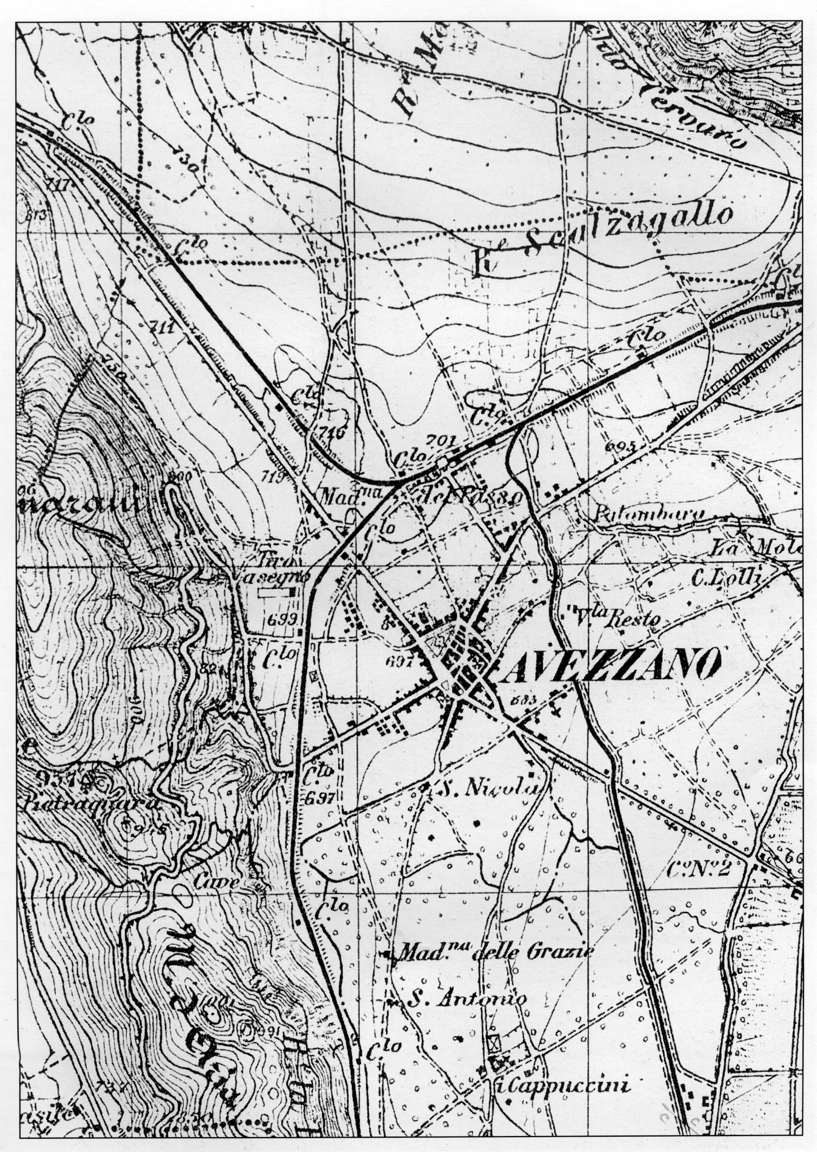 Carta dell'Istituto Geografico Militare del 1907